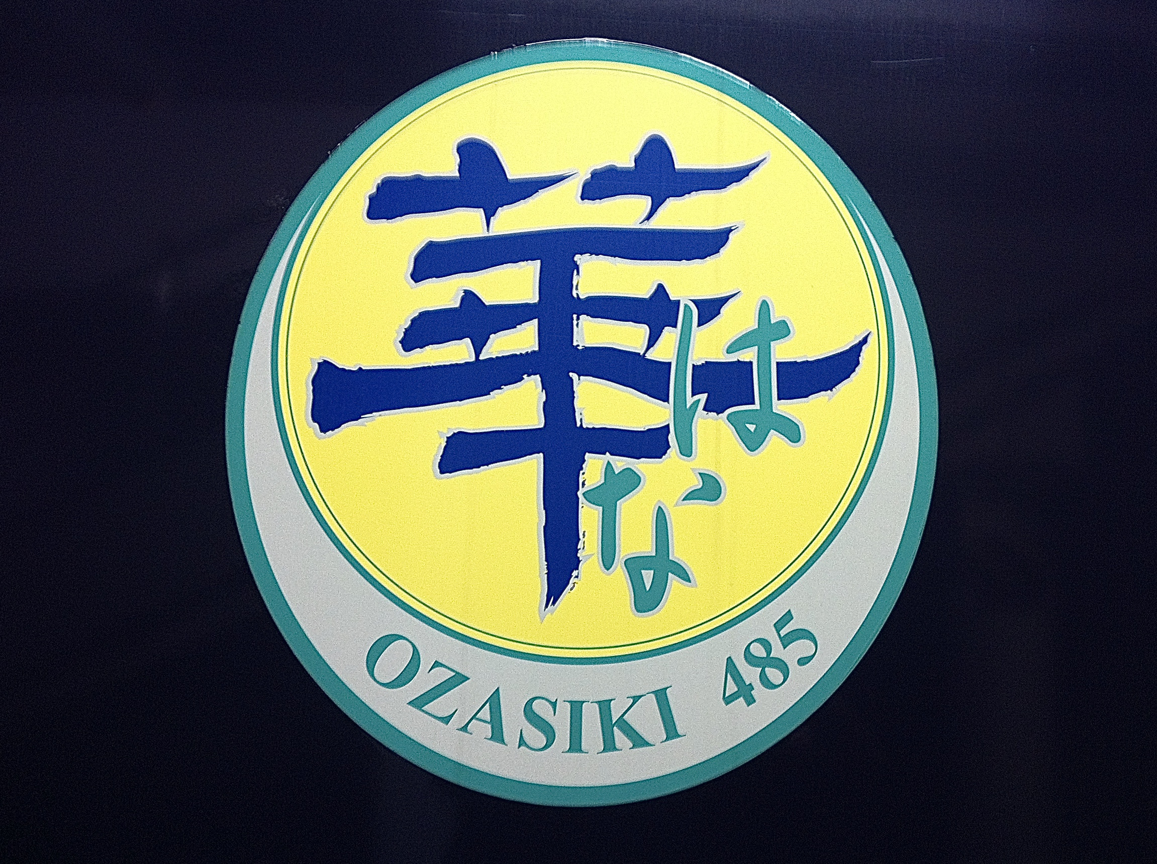 485系華ロゴマーク